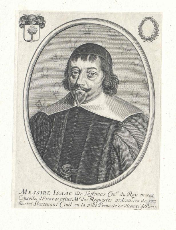 Isaac de Laffemas